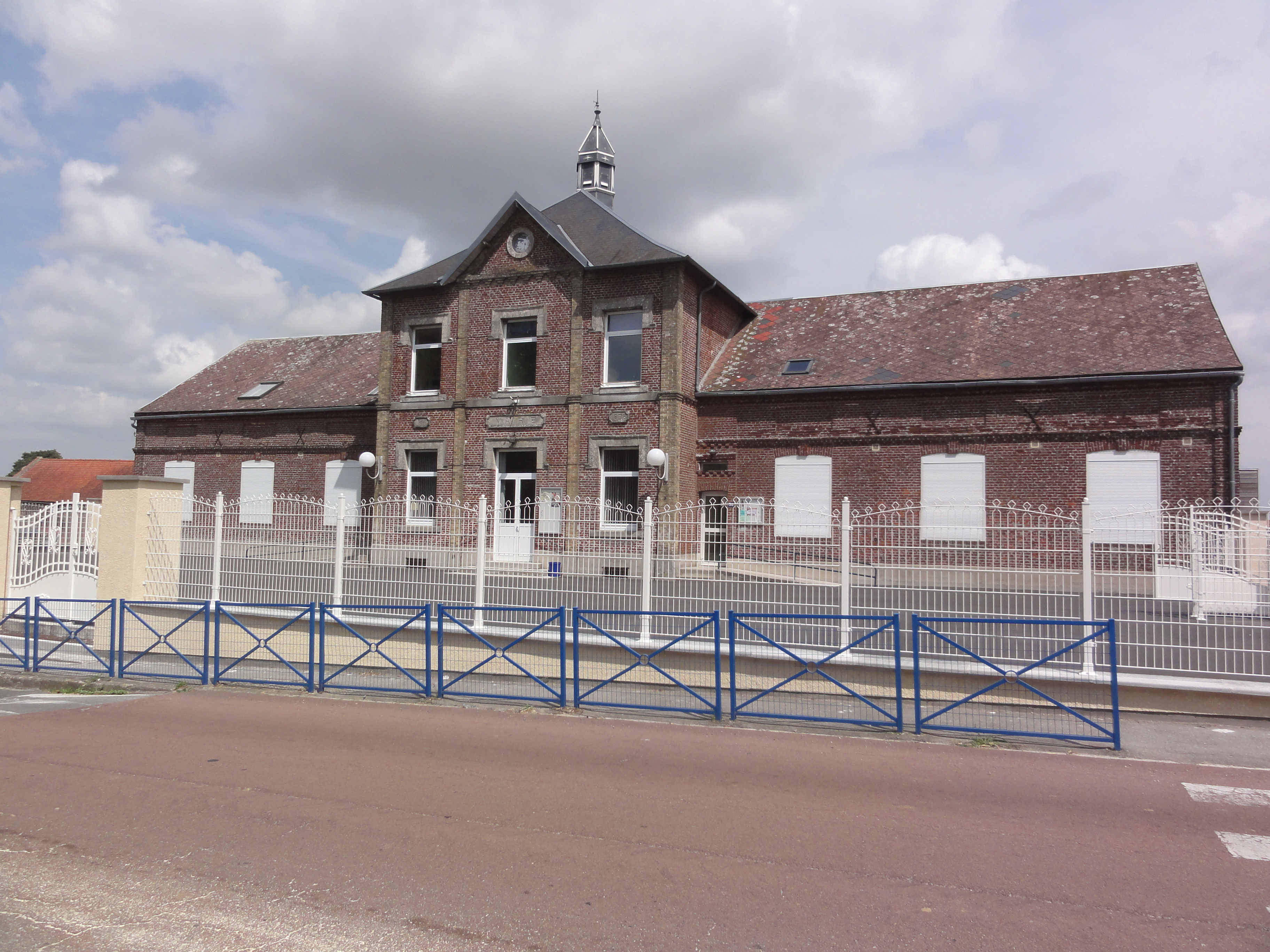 Prémont (Aisne) mairie-école